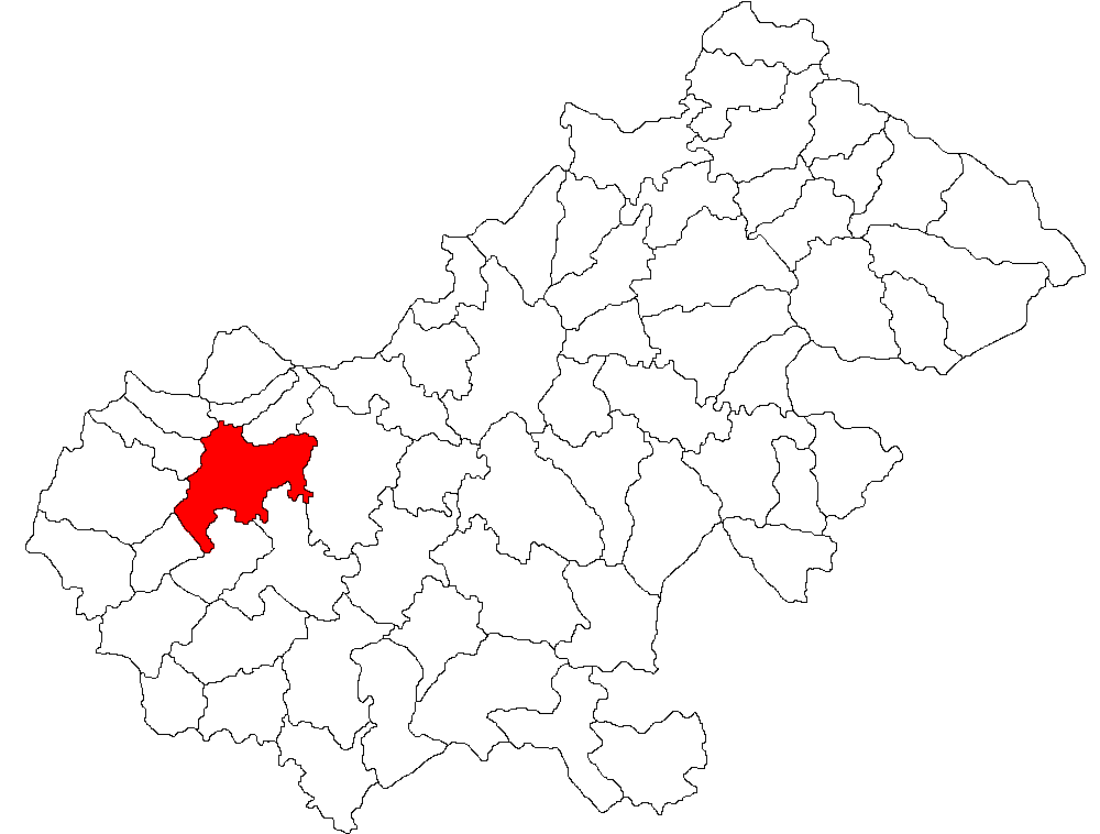 Categorie:Hărţi ale judeţului Satu Mare